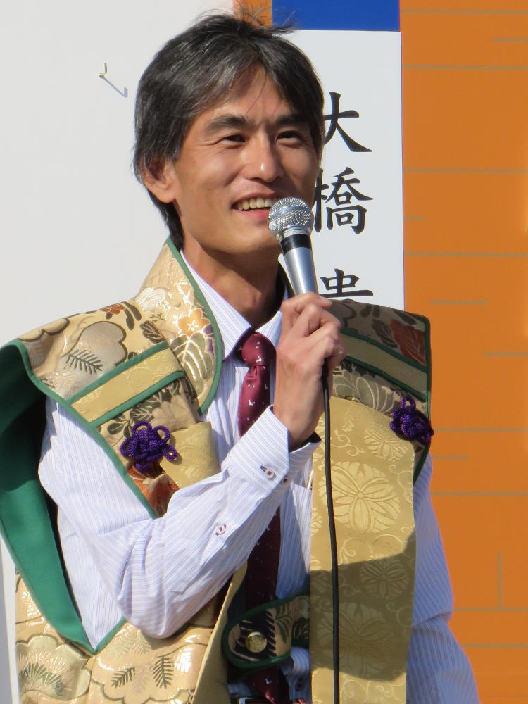 将棋棋士の山本真也（平成３０年１１月、姫路市で行われた人間将棋にて）